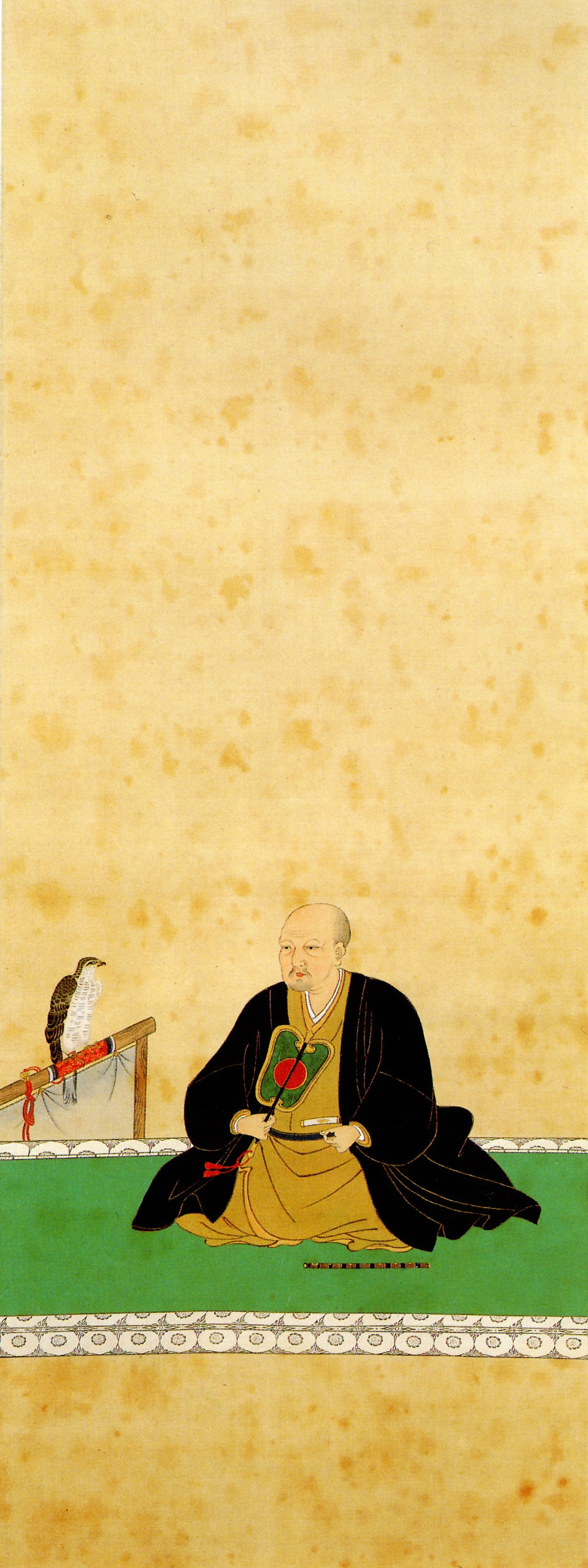 松浦隆信の肖像。